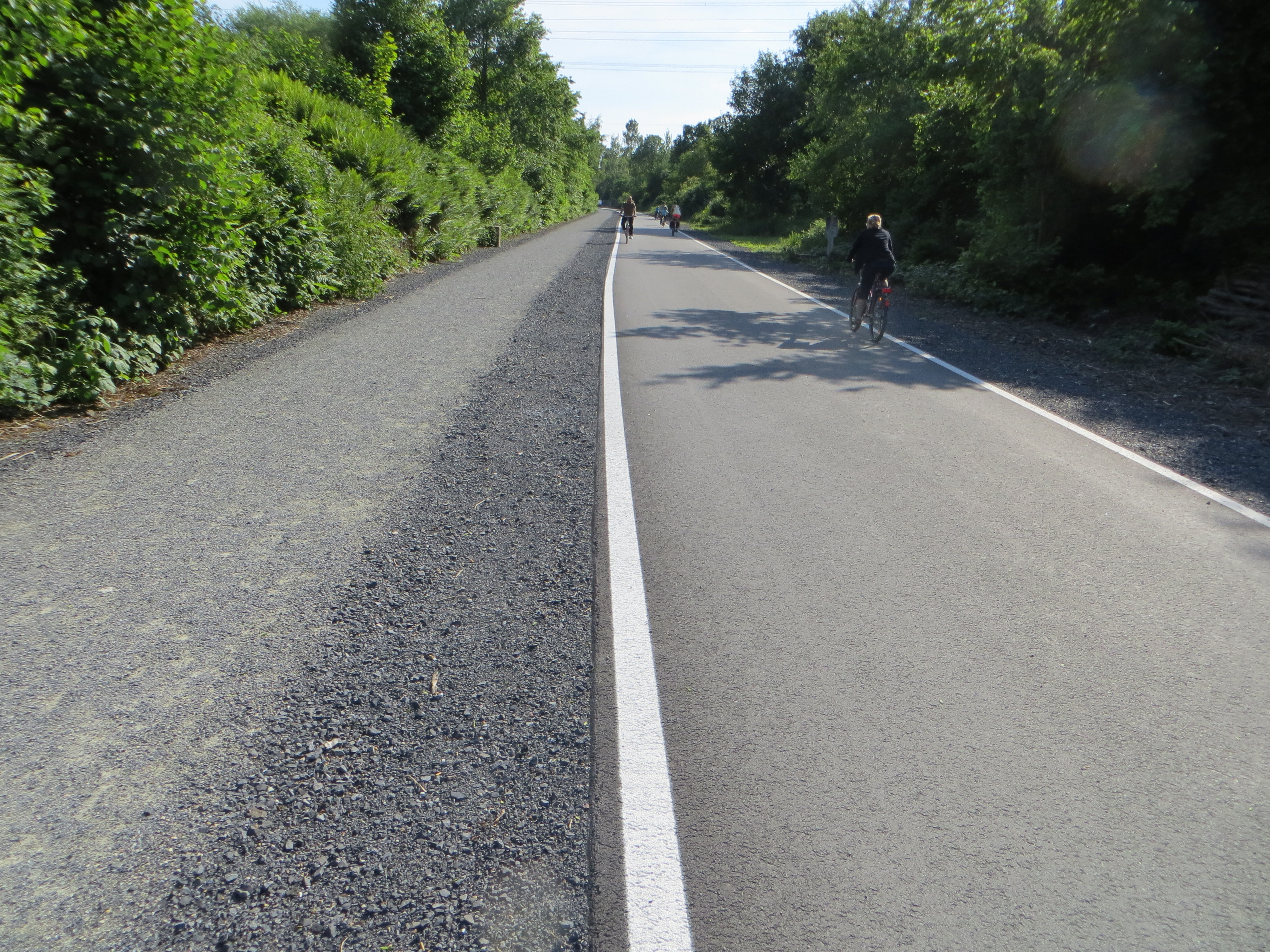 Der Radschnellweg Ruhr an der Stadtgrenze Essen/Mülheim im Juni 2015.